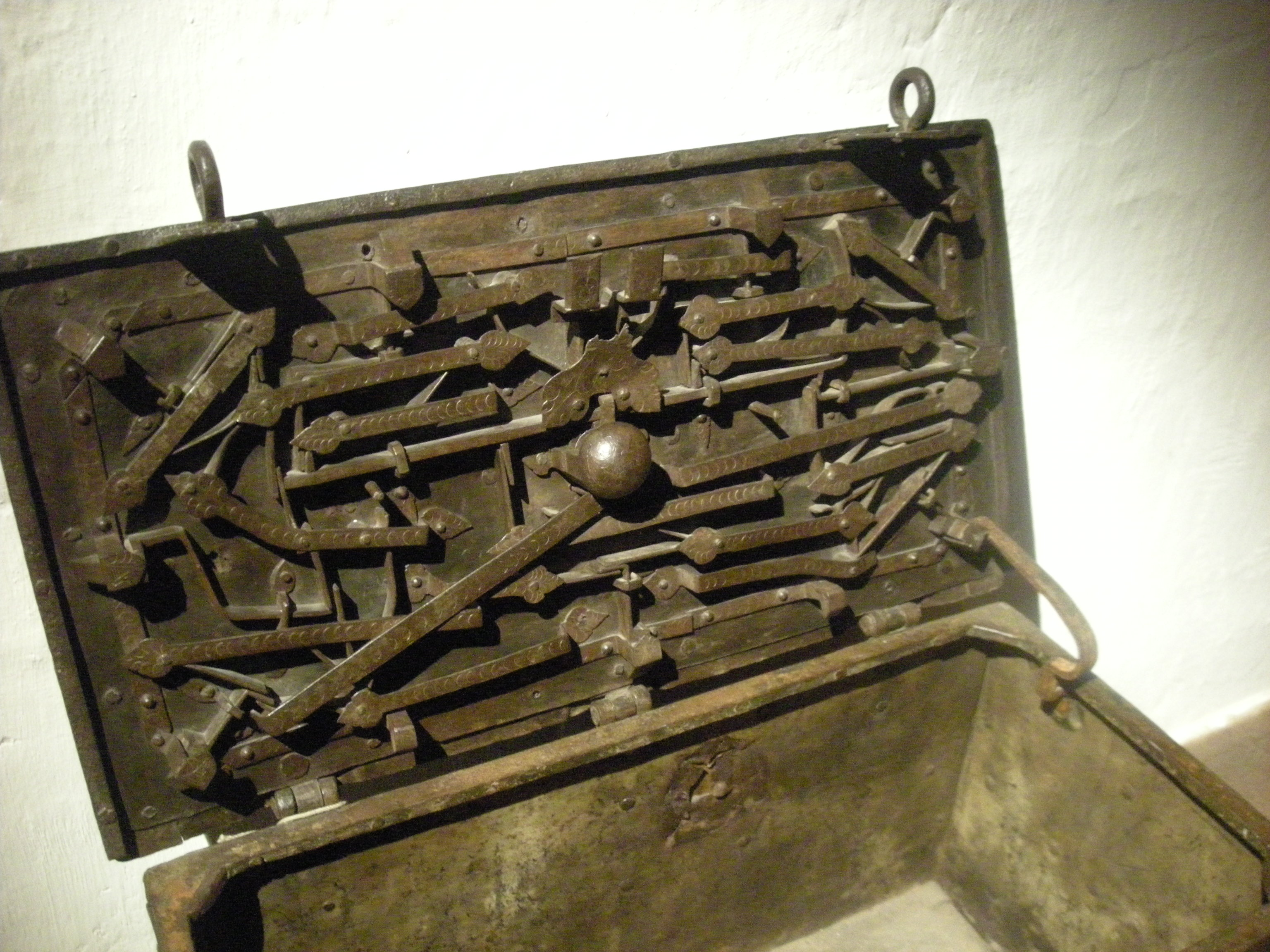 Mecanismo de una caja fuerte antigua